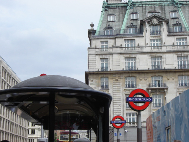 The Ritz & "Green Park" Underground Station